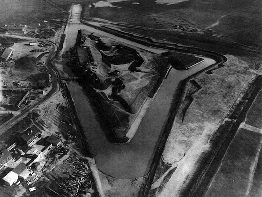 Снимок форта "Ж" ("Дубинники") с дирижабля "Беркут" 1915 г.